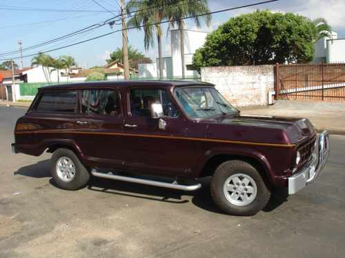 Camioneta Chevrolet Veraneio, ano 1989, fabricação brasileira